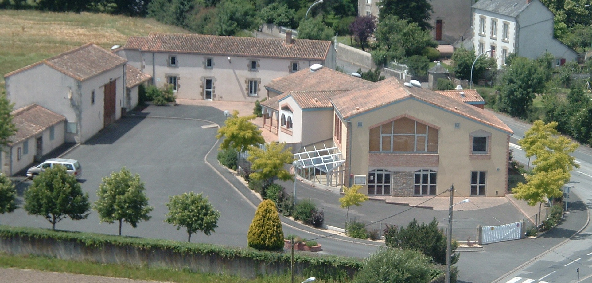 Salle des Fêtes de Noirterre (Deux-Sèvres - France)